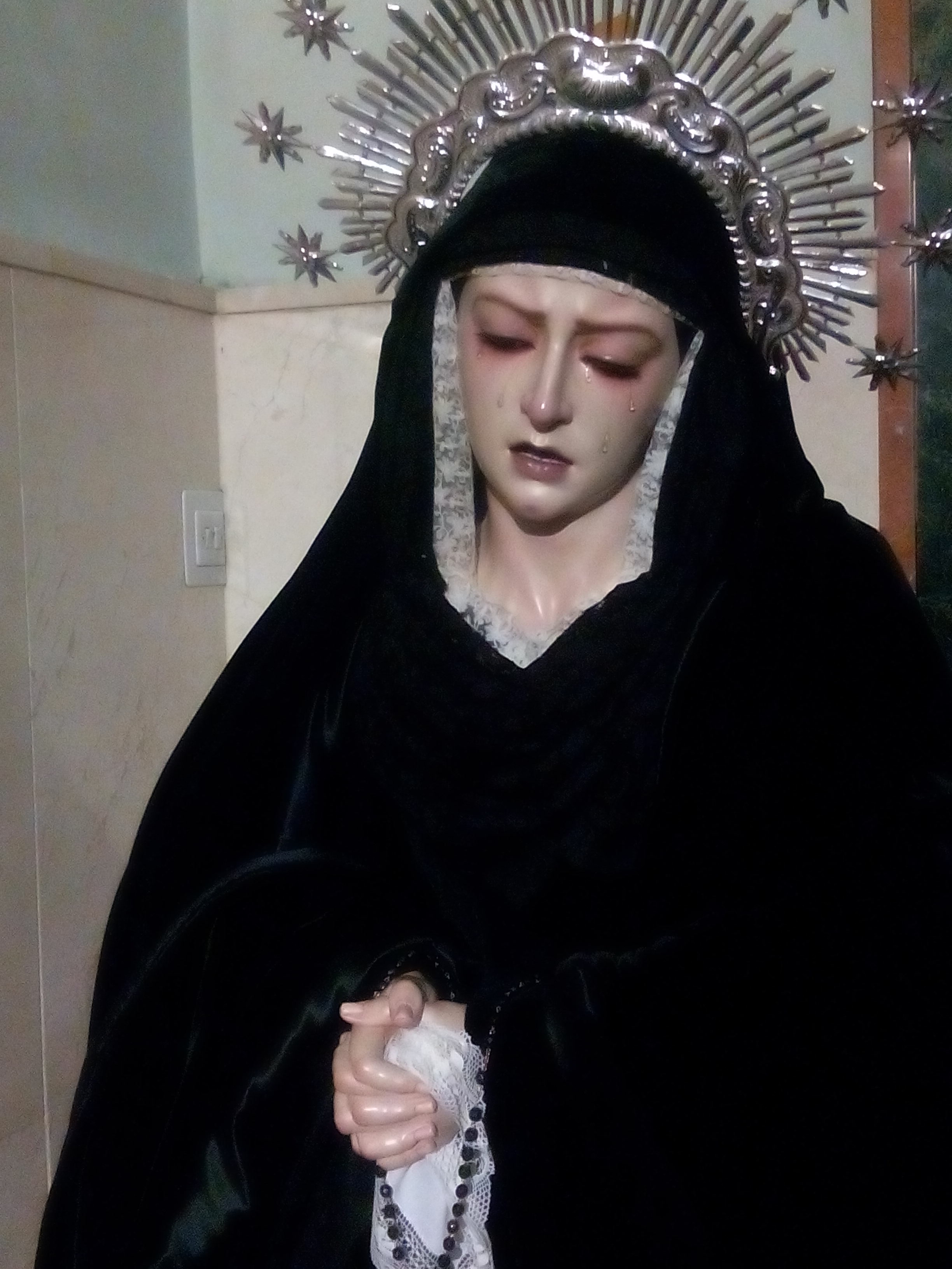 María Santísima Madre de Dios de la Hermandad del Silencio de Jaén.